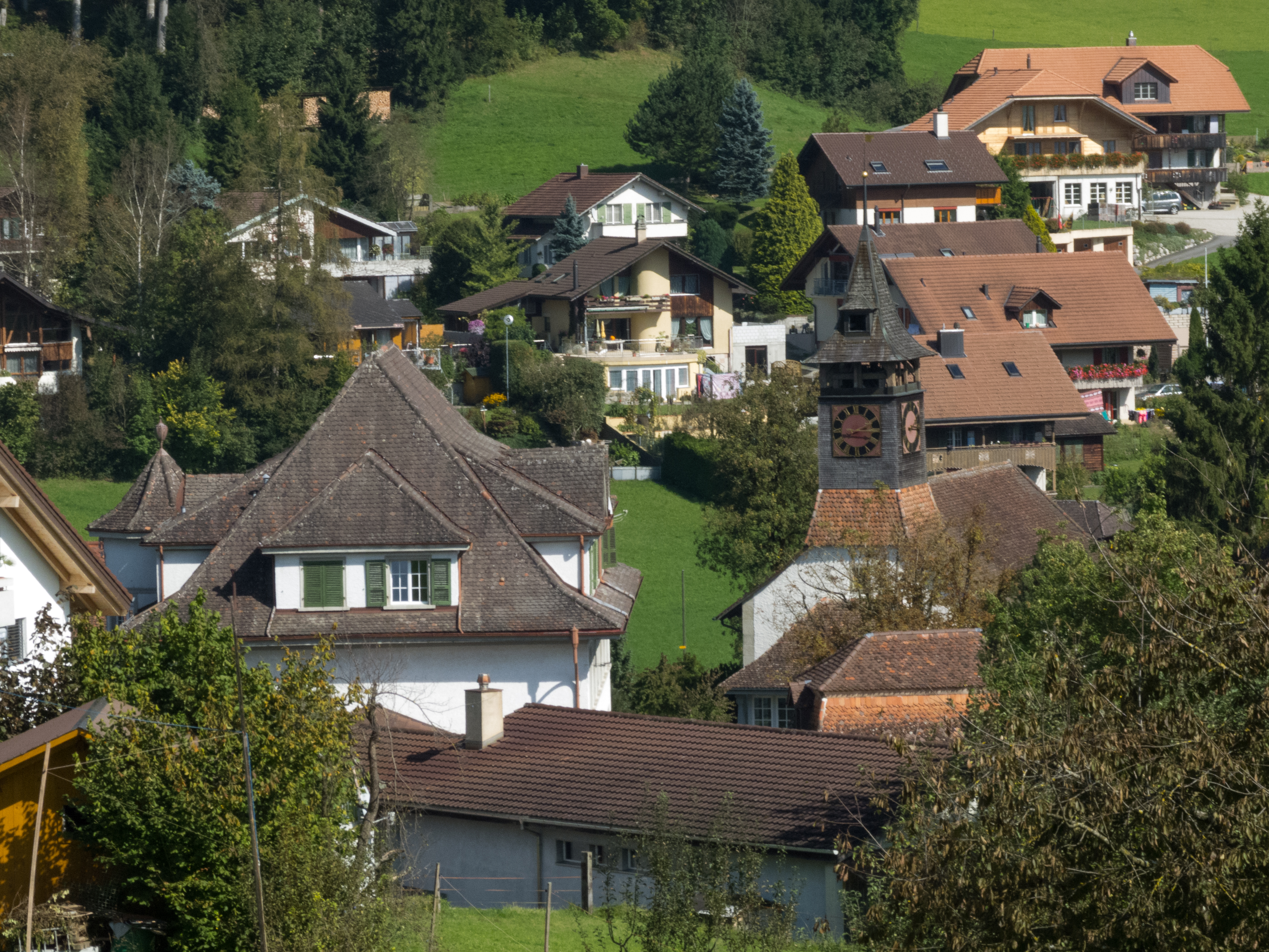 Gurzelen mit Kirche und Pfarrhaus